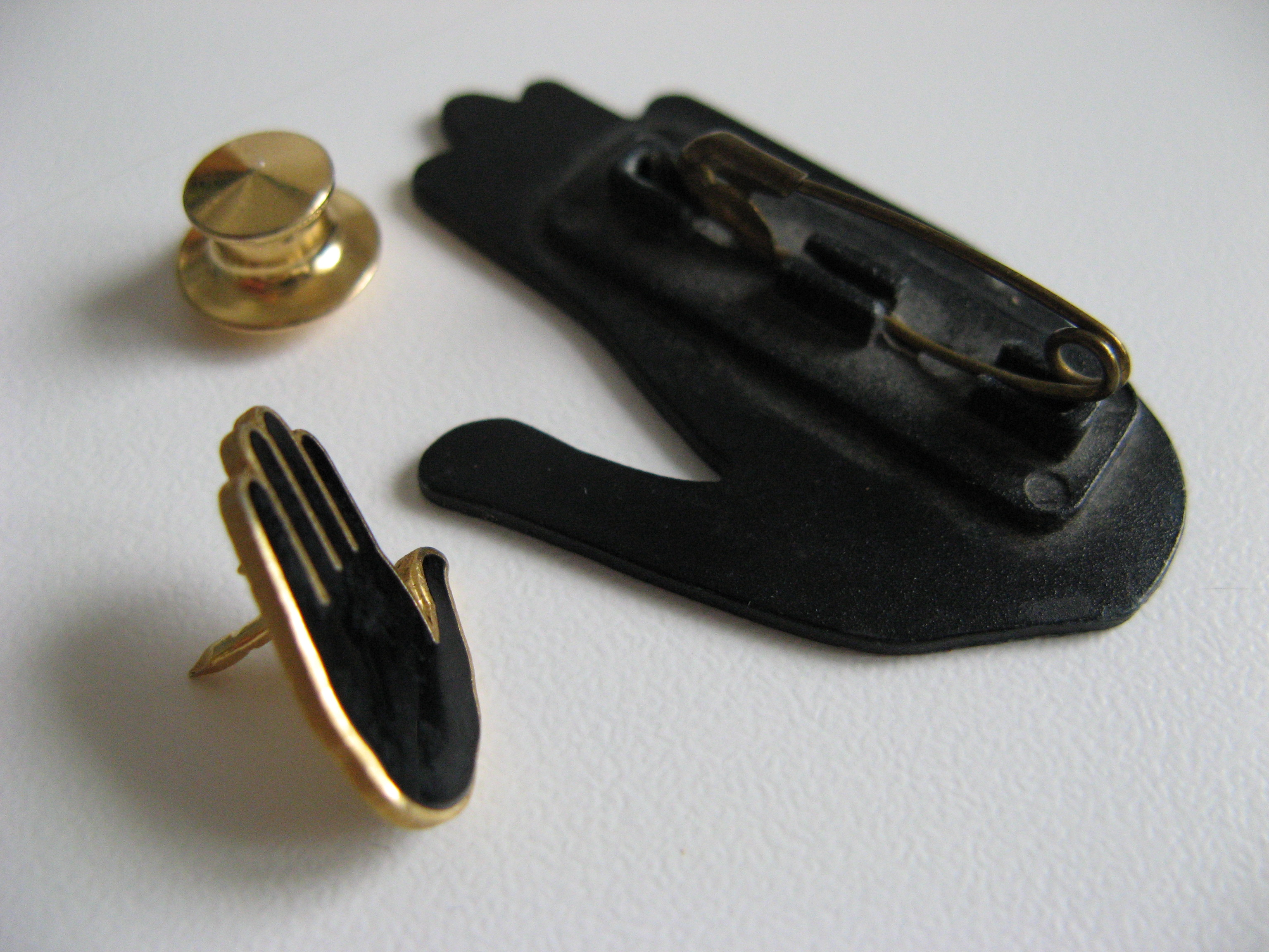 La forme de main de l'épinglette Touche pas à mon pote avec son épingle de sureté est un intermediaire entre le badge et le pin's